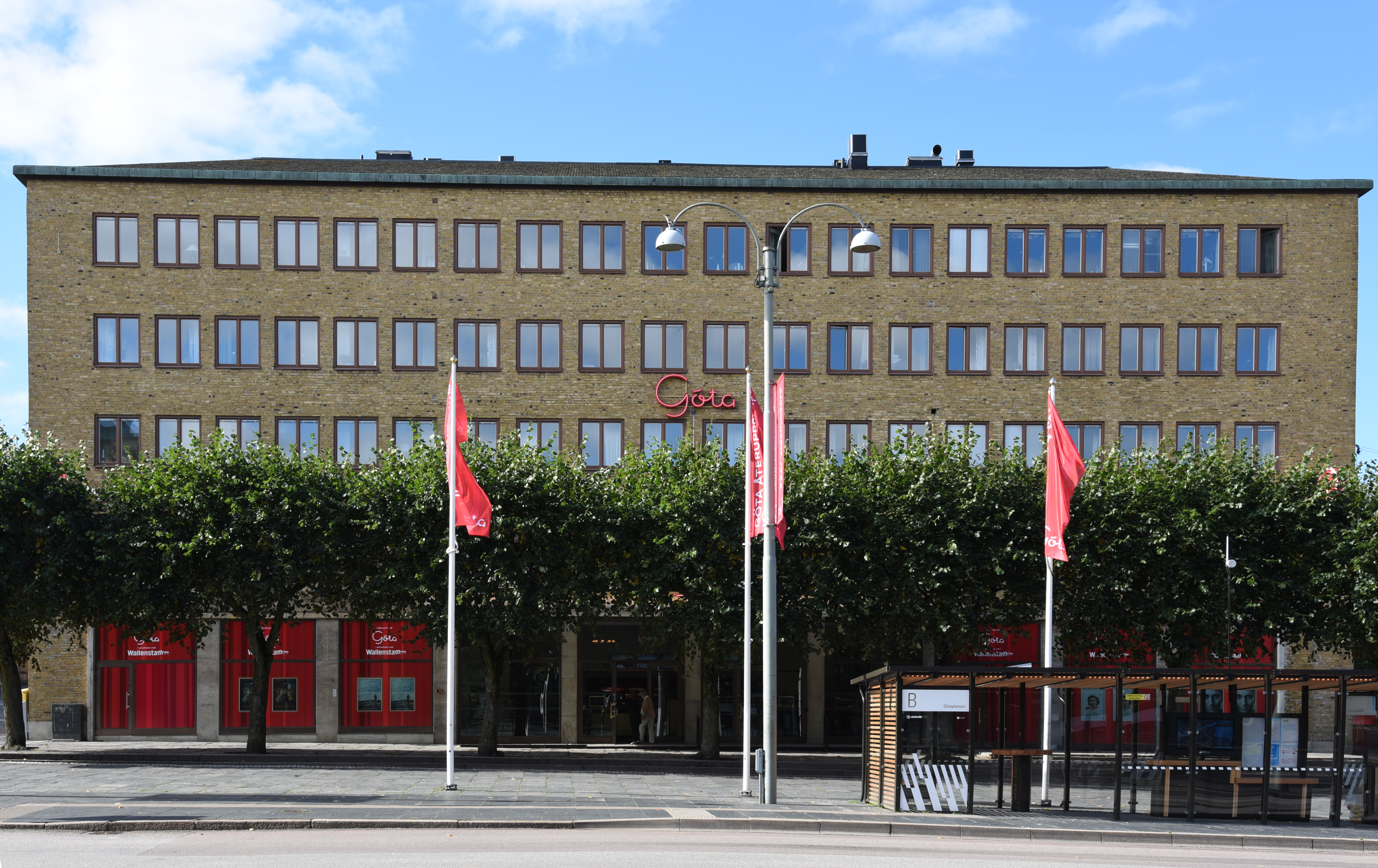 Götapalatset vid Götaplatsen 9 i stadsdelen Lorensberg i Göteborg. I byggnaden är biografen Göta inrymd.